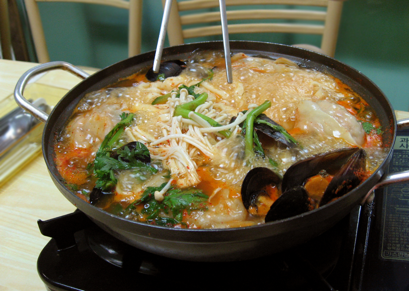 만두전골